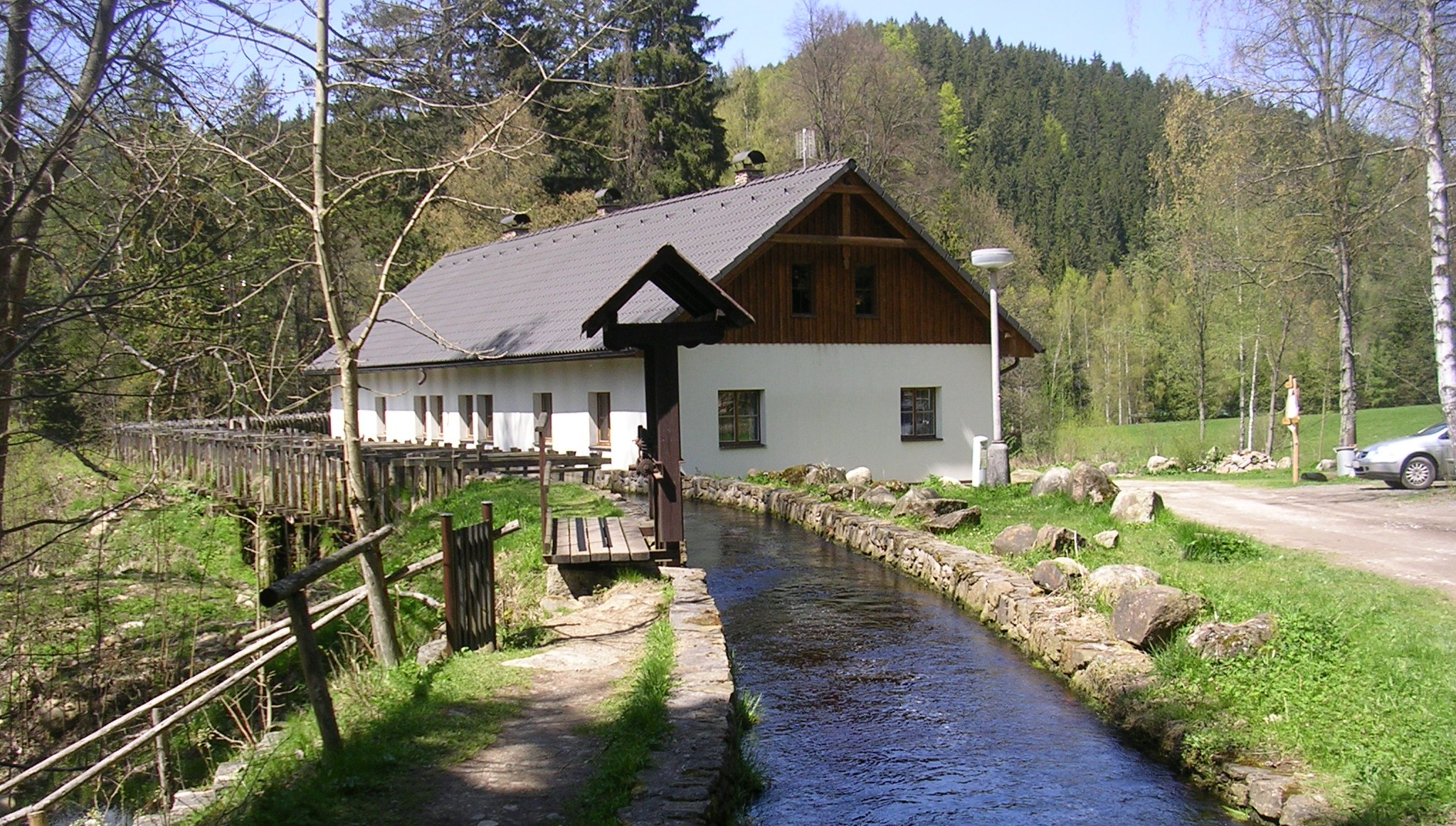 náhon Čeňkovy pily